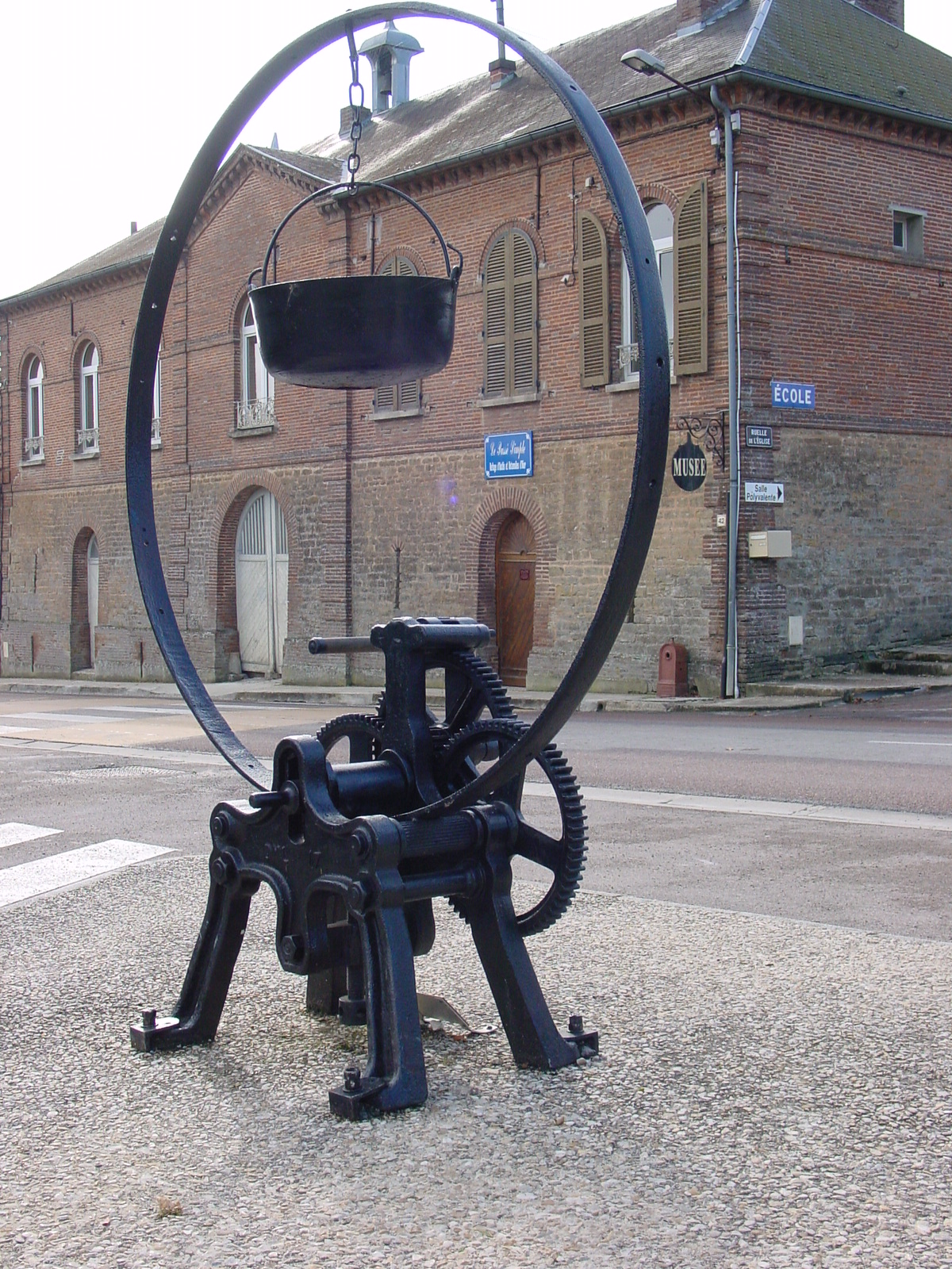 Le musée du passé simple - rue principale - 10320 CRESANTIGNES